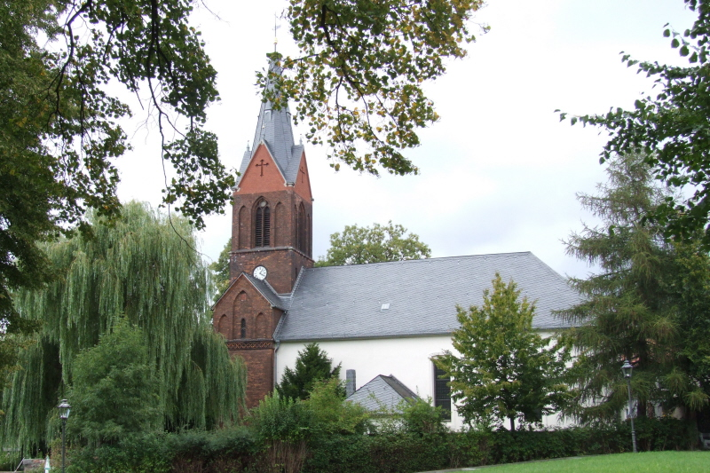 Dorfkirche in Berlin-Kaulsdorf Fotograf: Harald Rossa Datum: August 2006 Höher aufgelöste Version ist verfügbar